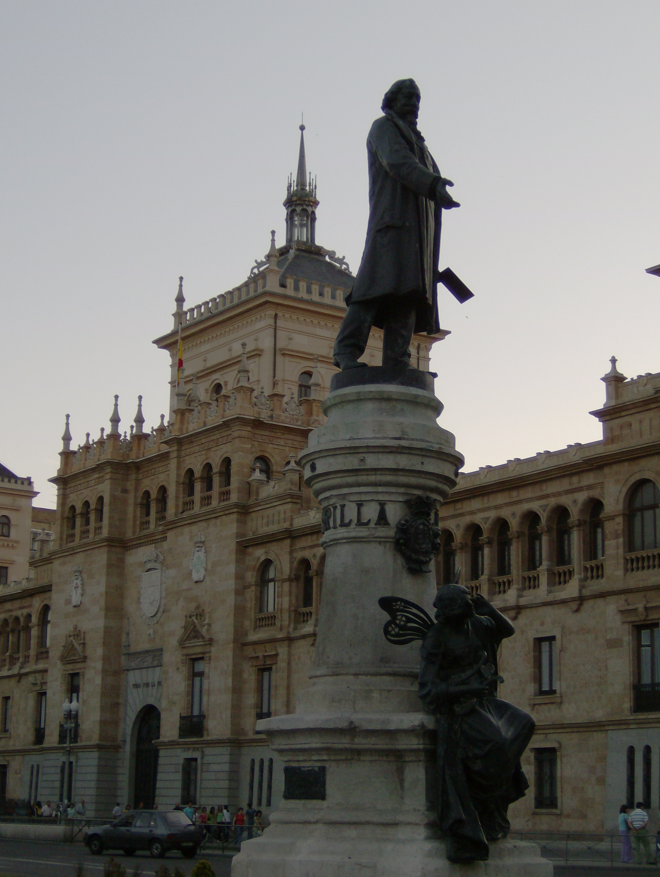 Plaza Zorrilla (Valladolid)